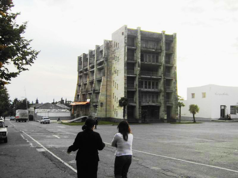 Lagodekhi in kakheti Georgia